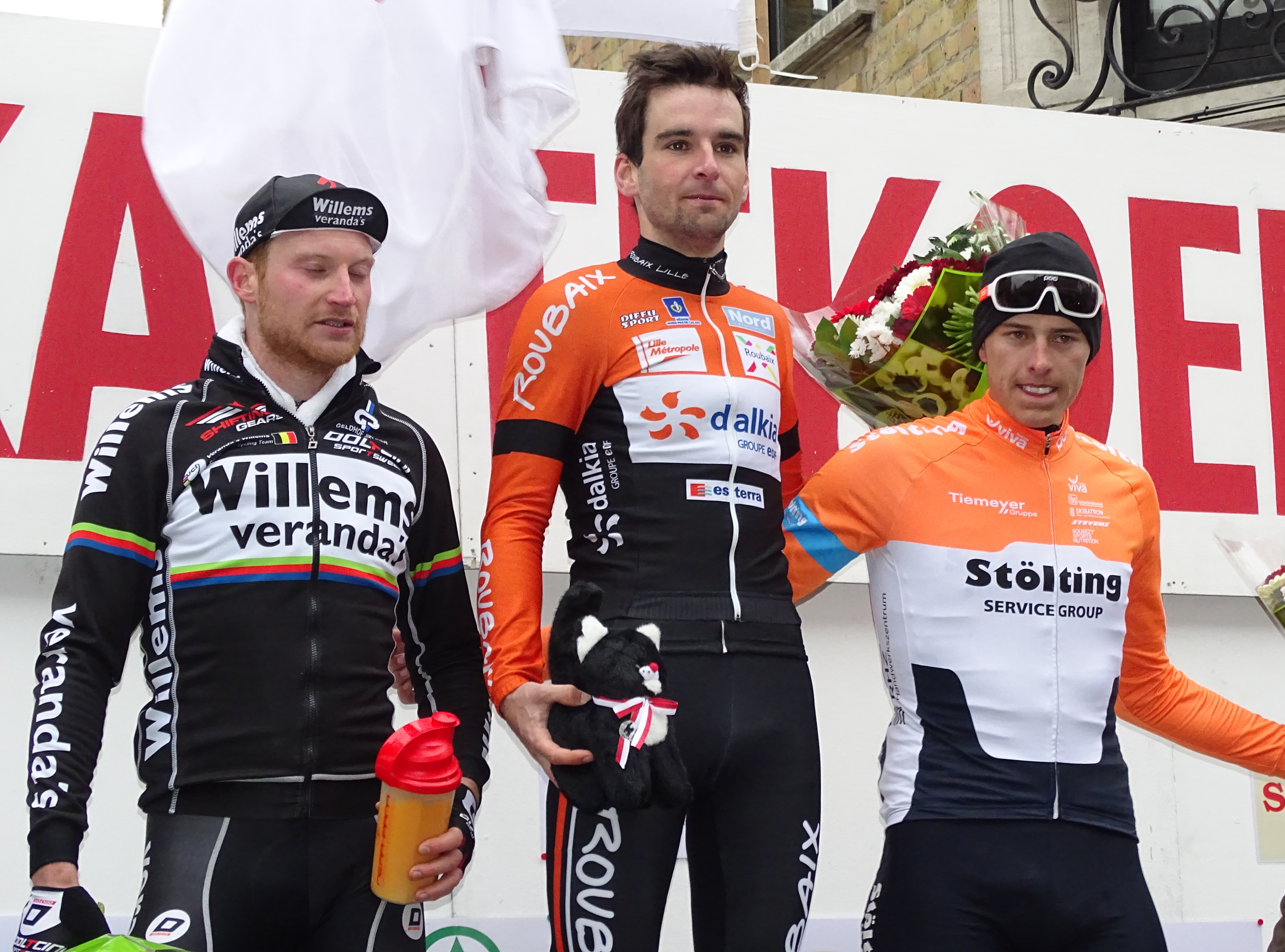 Reportage réalisé le dimanche 15 mars à l'occasion du départ et de l'arrivée de la Course des chats 2015 à Ypres, Belgique.